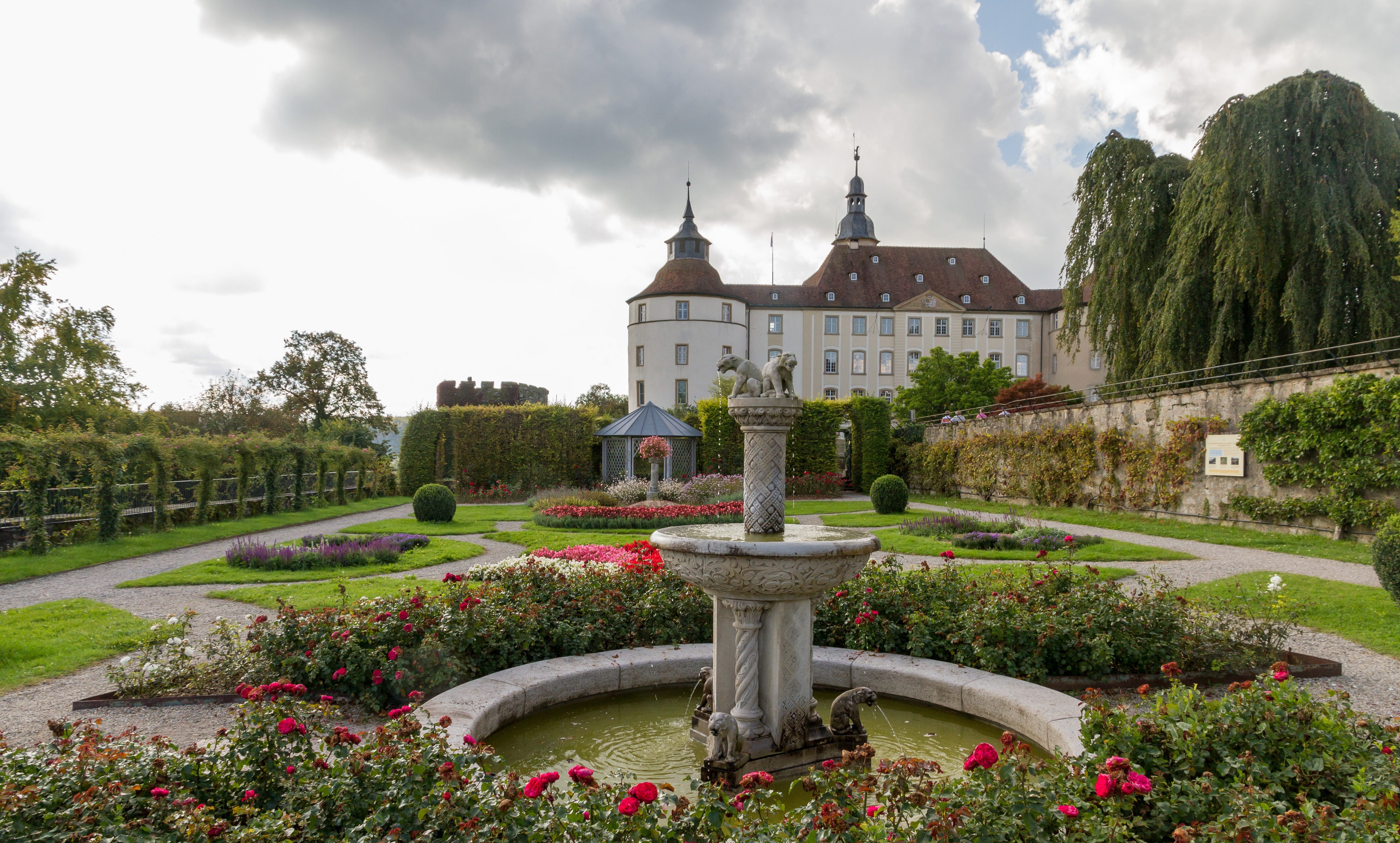 Schlossgarten von Schloss Langenburg